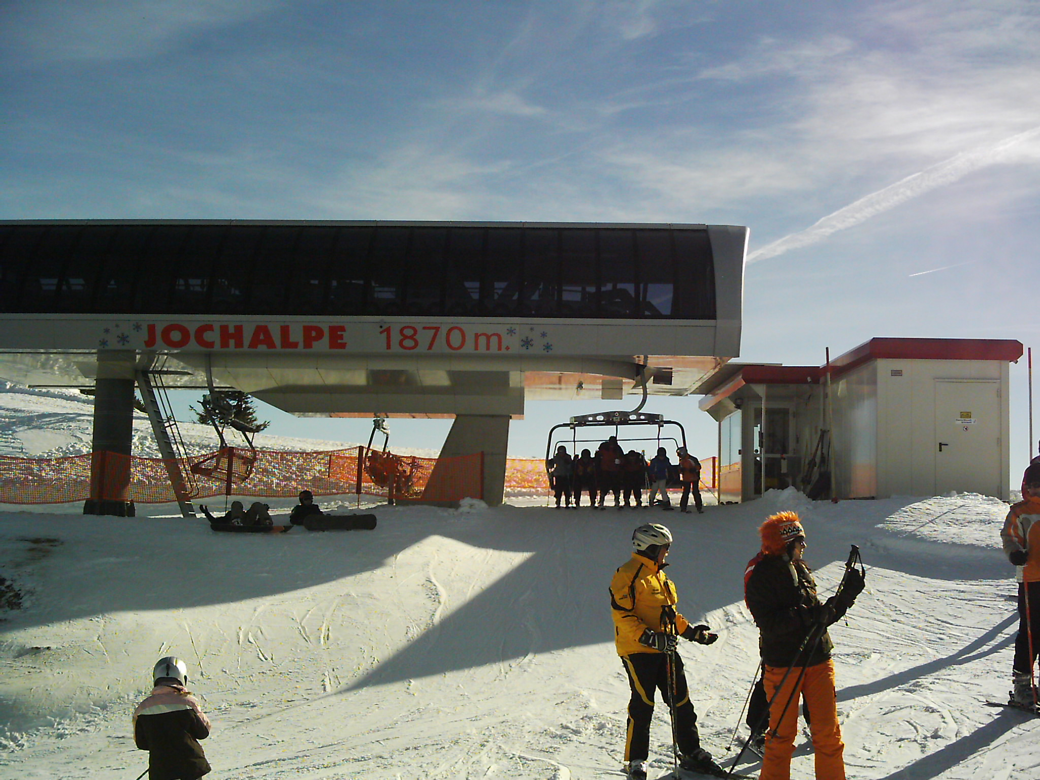 Bergbahn Füssener Jöchle in Grän, Tannheimer Tal, Tirol